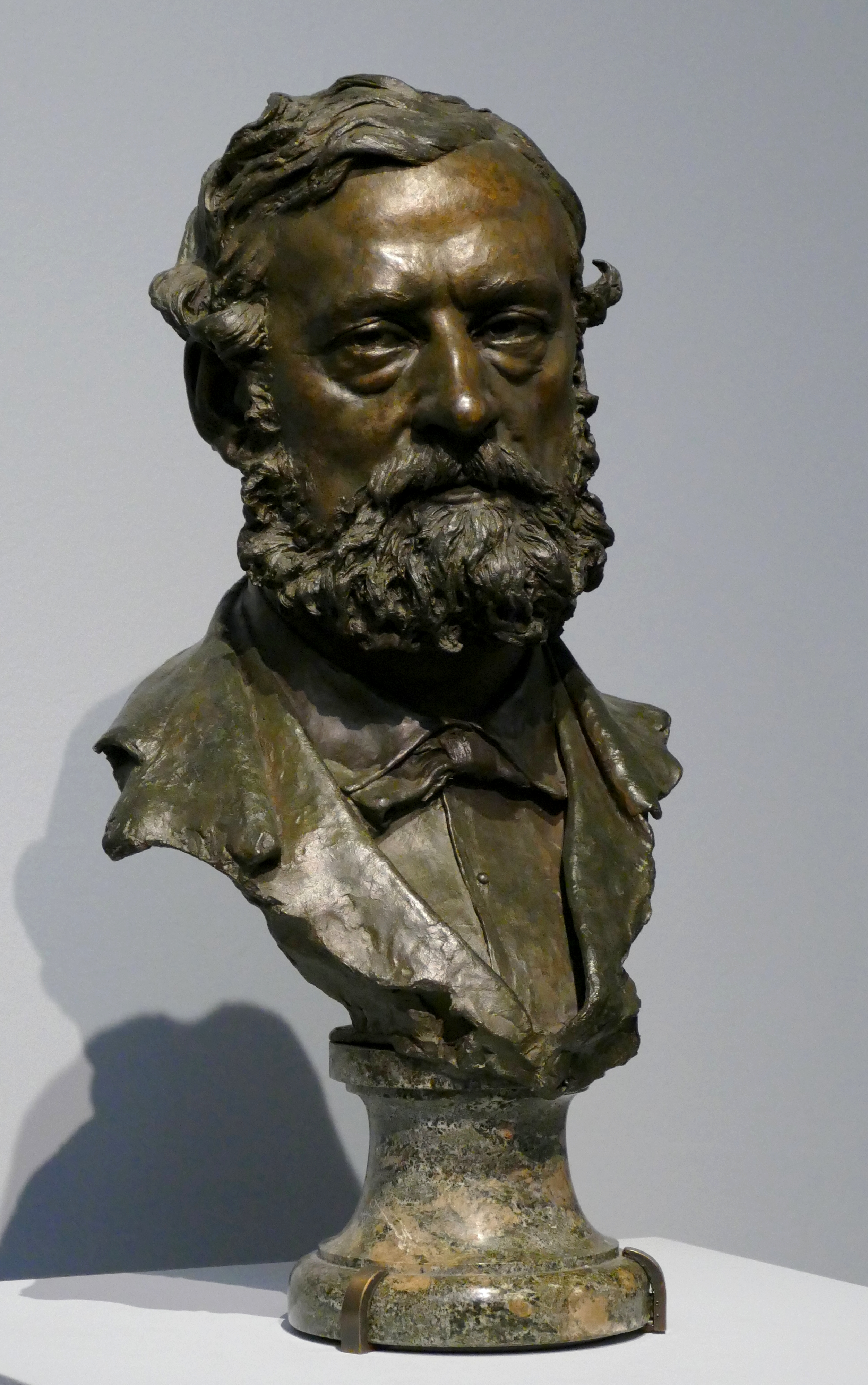 Buste en bronze de Paul Dubois, par Vincenzo Gemito, 1879. prêt du Musée Camille Claudel, (Inv. 1906.12.) - Exposition Vincenzo Gemito, le sculpteur de l'âme napolitaine, Petit Palais, Paris, novembre 2019 - janvier 2020.